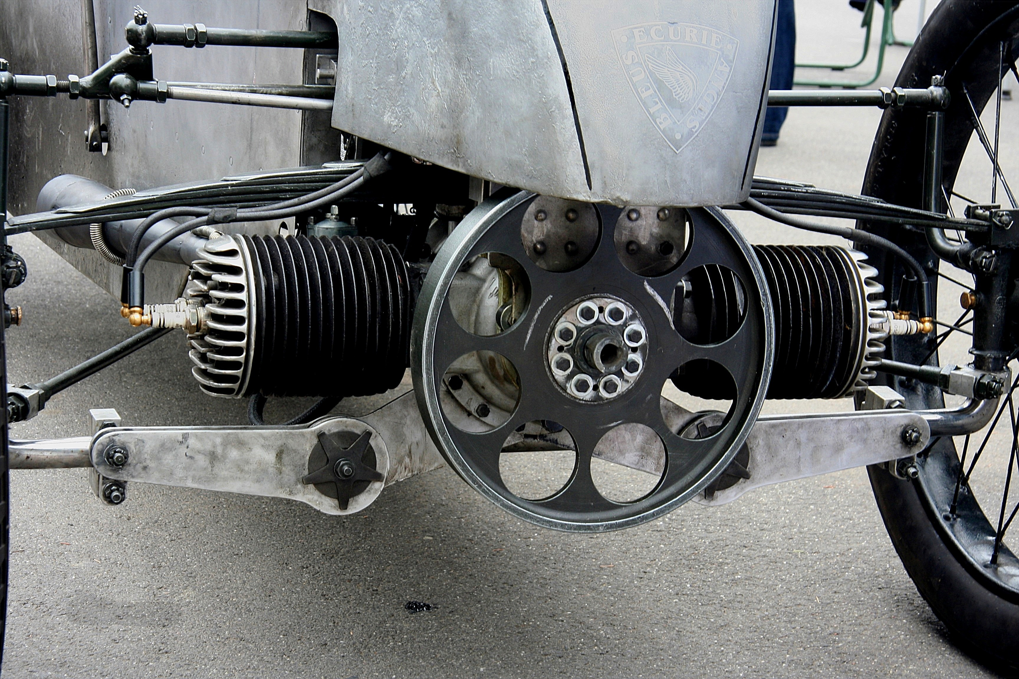 Sima-Violet, Baujahr um 1924 (vordere Starrachse)